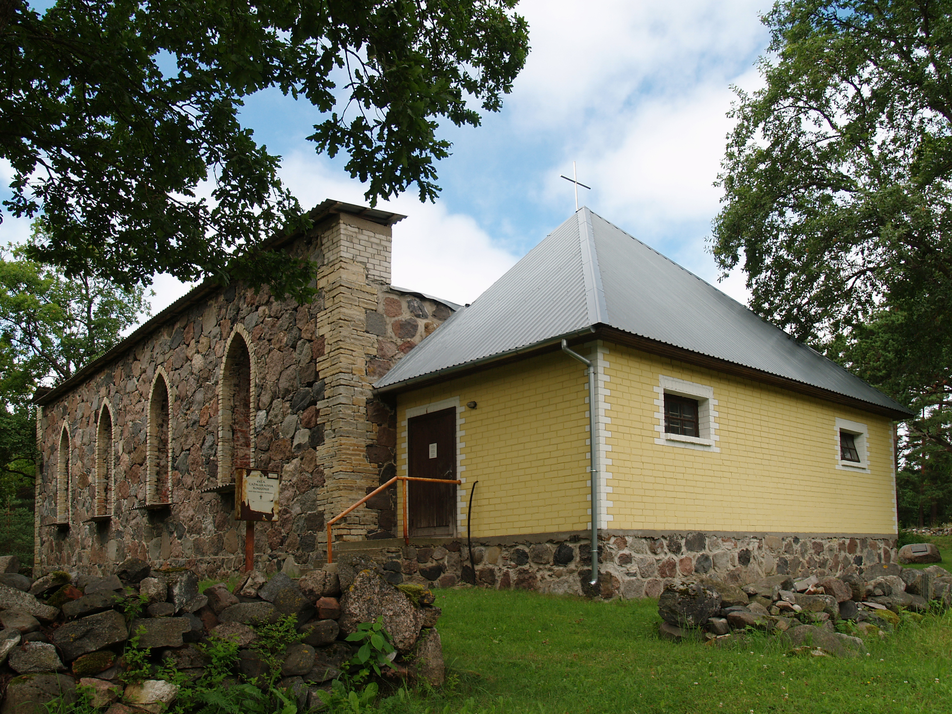 Tahkuranna kirik